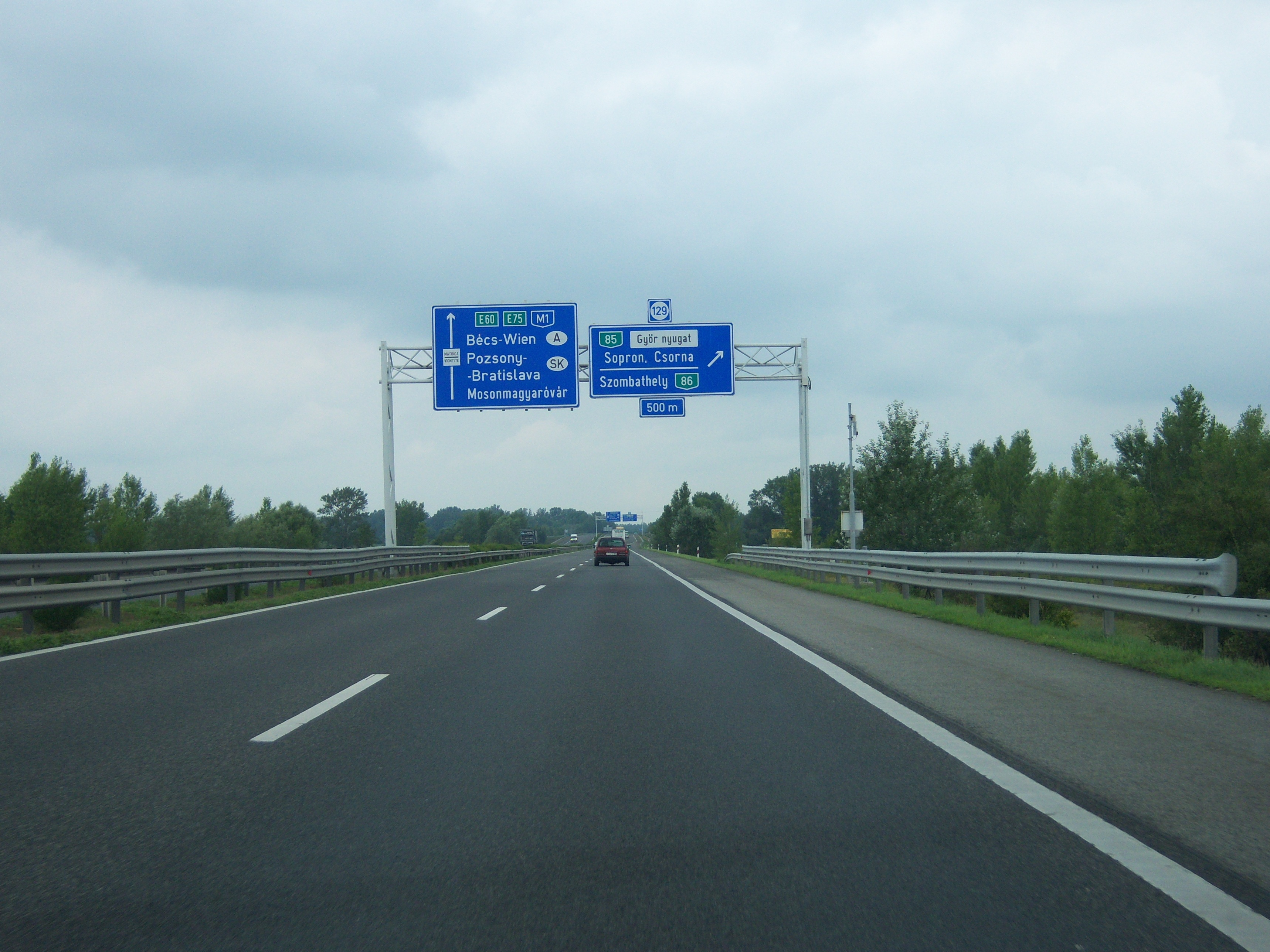 Autópálya M1 Richtung Wien bei der Ausfahrt in Richtung Sopron bzw. Szombathely